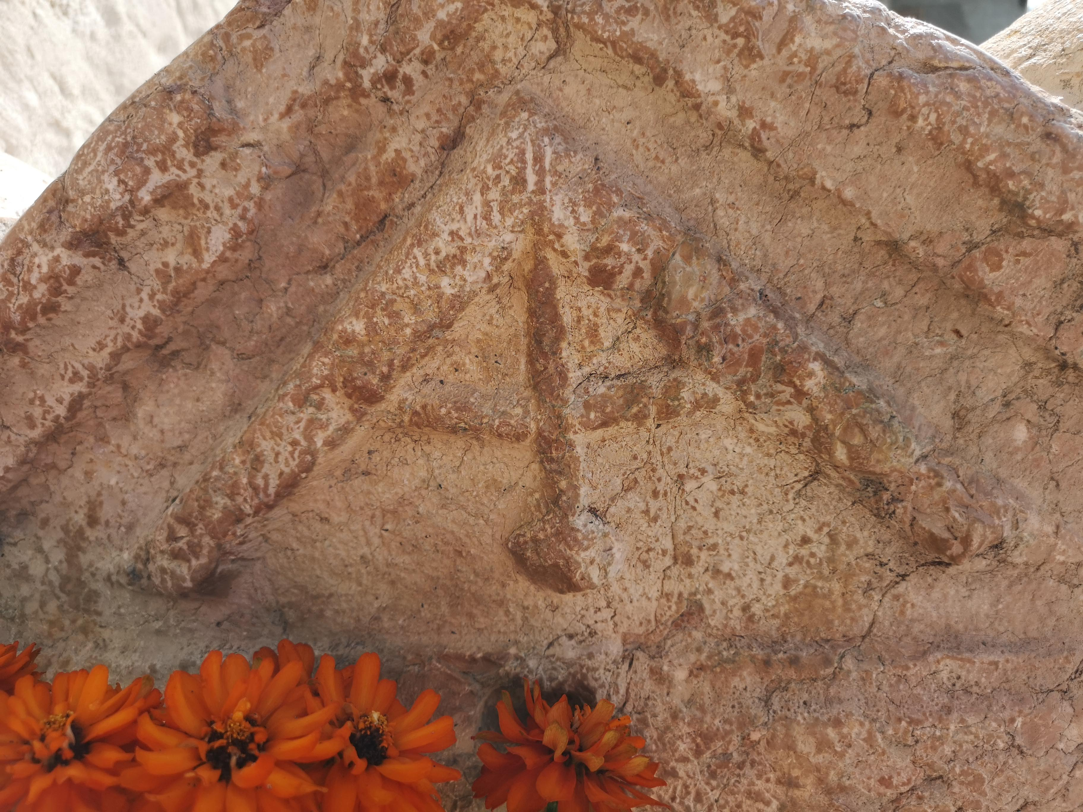 Faucon de Barcelonnette. Couvercle de sarcophage romain exposé devant l'église. Détail du fronton latéral, figurant une archipendule, niveau formé d'une équerre et d'un fil à plomb (symbole d'égalité devant la mort)